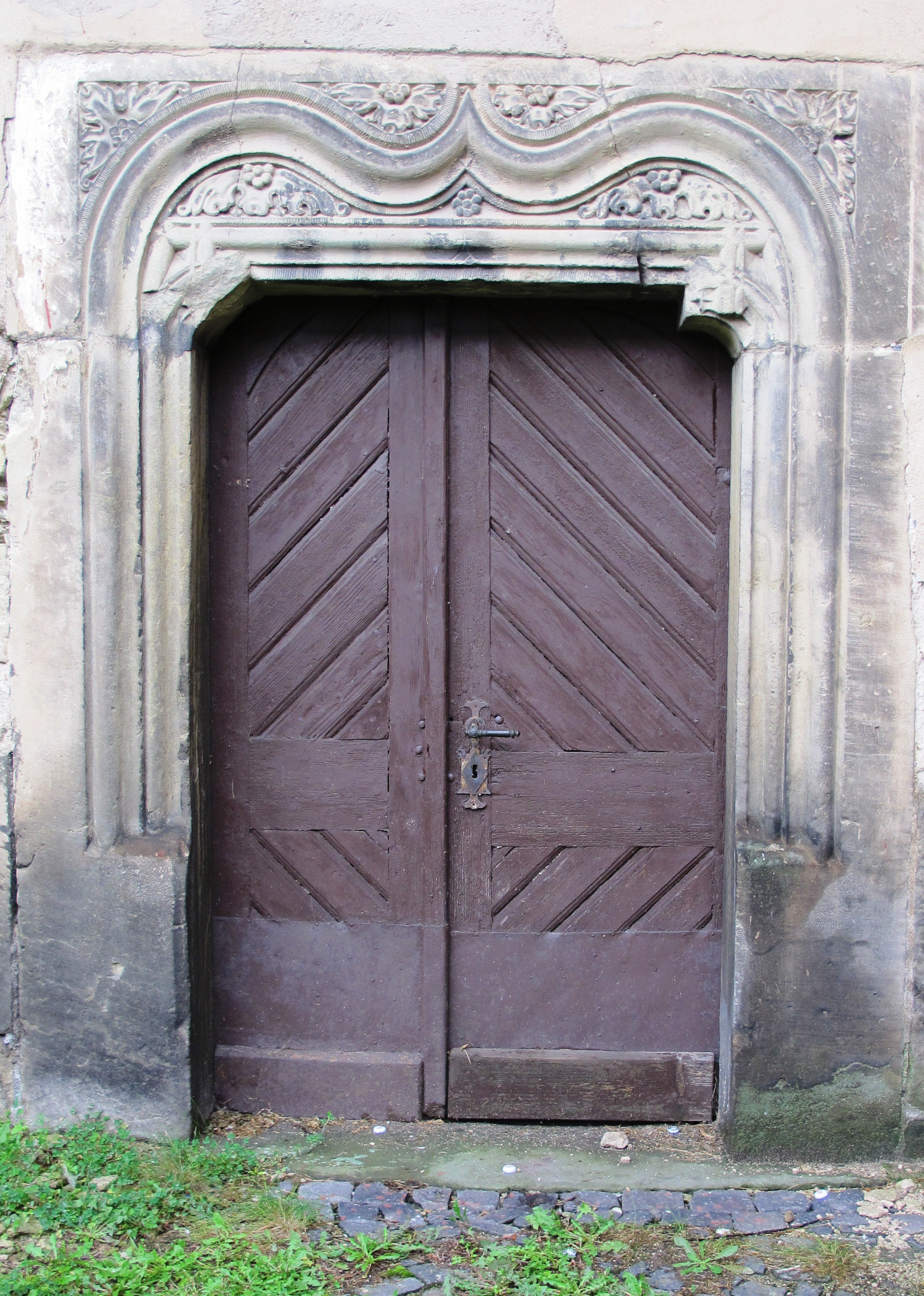 Česky: Chrudim, kostel sv. Kateřiny, jižní portál.